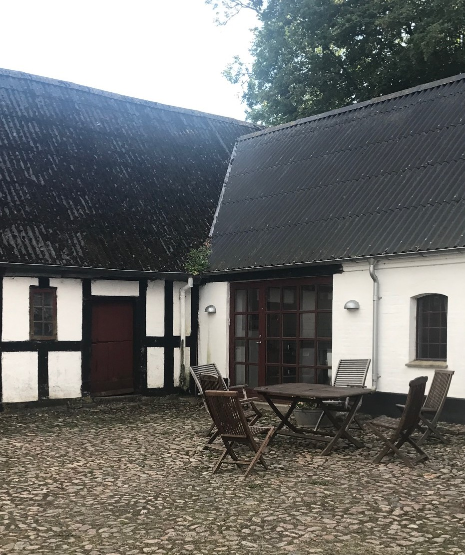 Albergue del Haervejen en Jelling, Dinamarca.